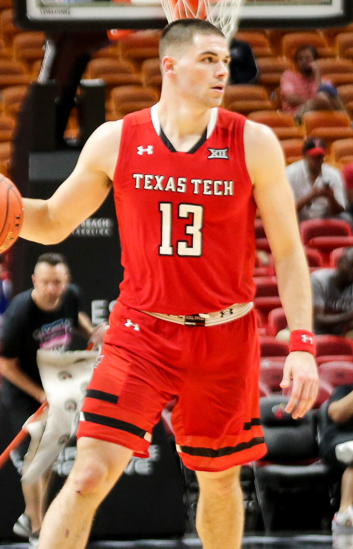 IC3A3966